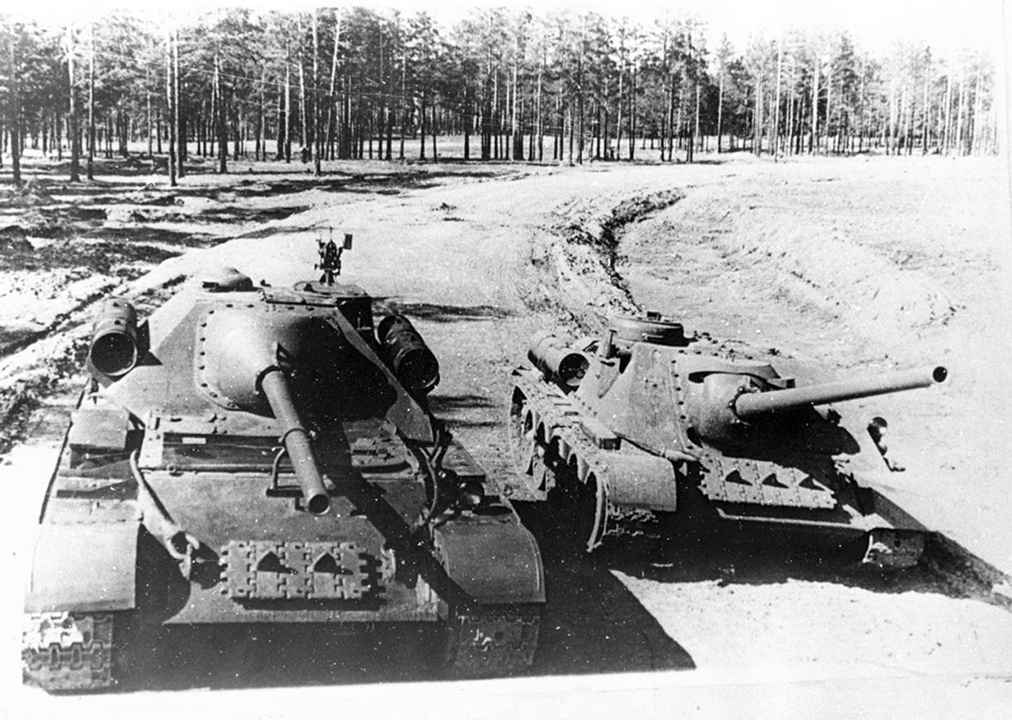 СУ-101 и СУ-100 на танкодроме Уралмашзавода, апрель 1945 года